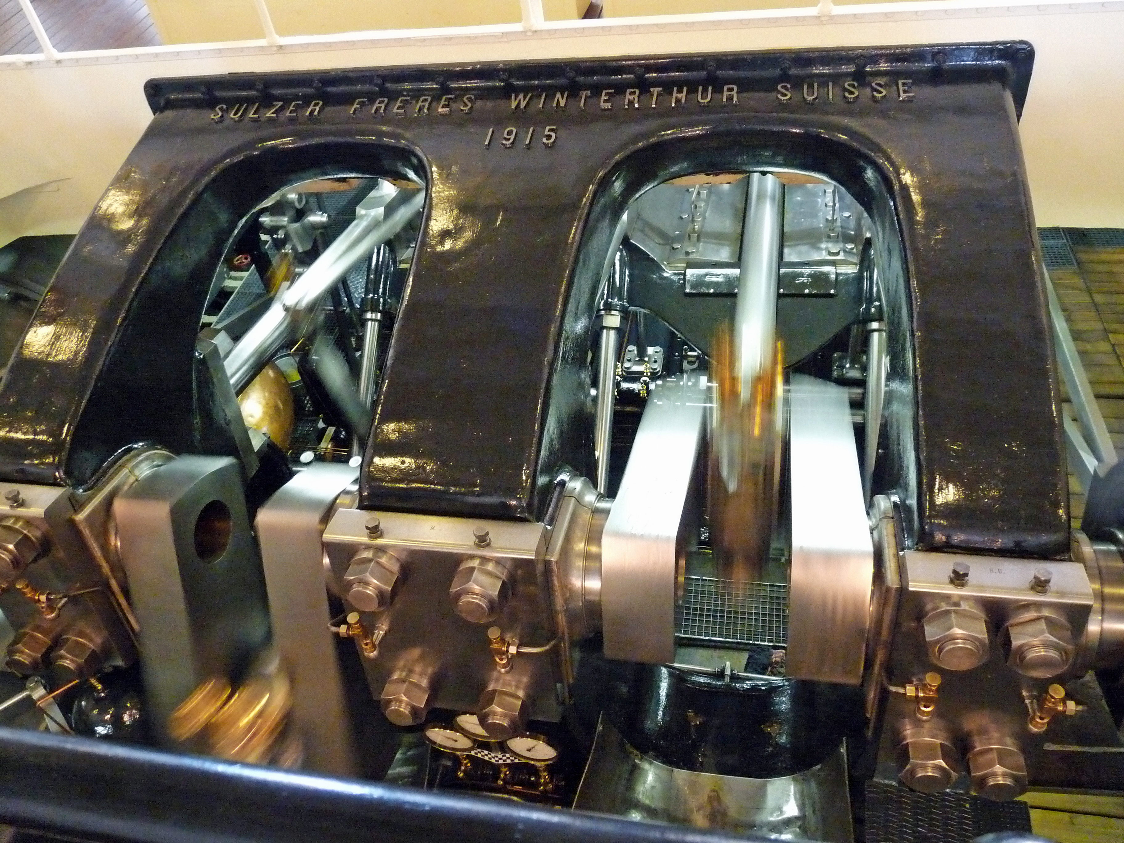 Machine Sulzer Frères (Winterthur, Suisse, 1915) sur le Simplon (Lac de Genève)